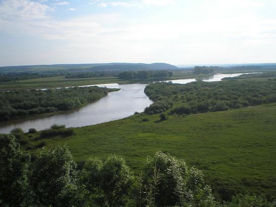 Краєвид на Дністер і Єзупіль.